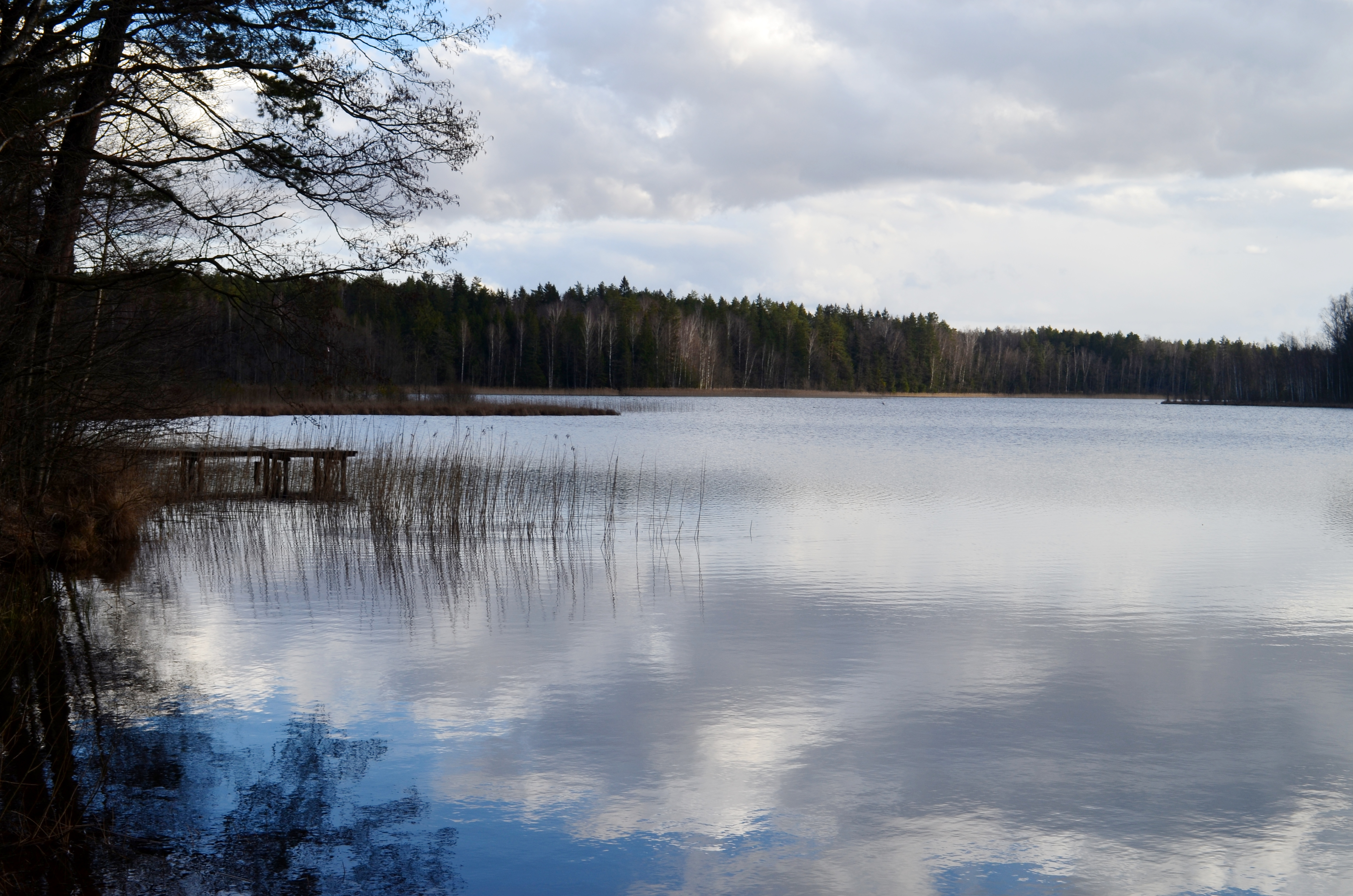 Priegodo ežeras, Anykščių raj.